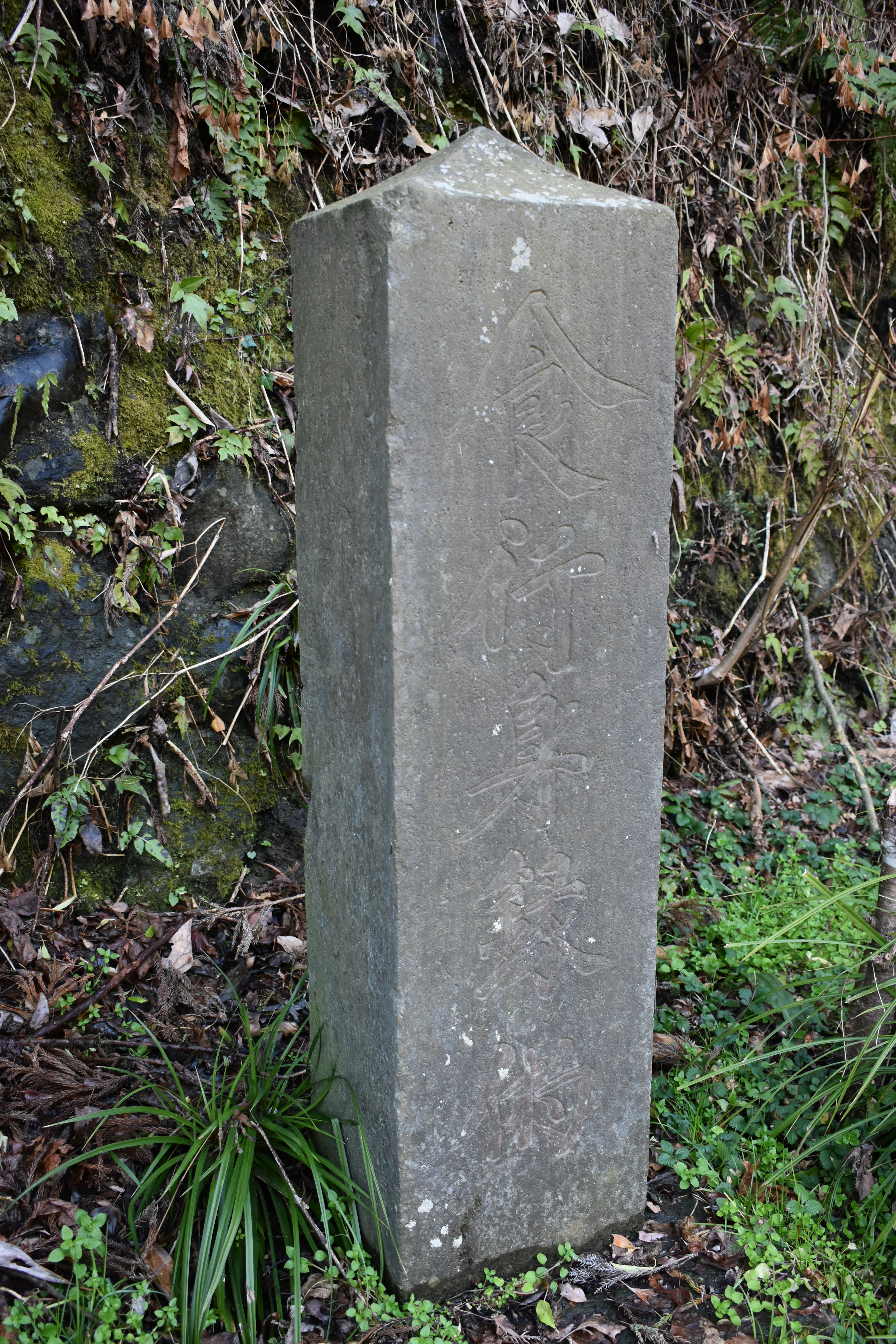 白糸の滝にある食行身禄の供養碑（天保年間建立、静岡県富士宮市上井出）